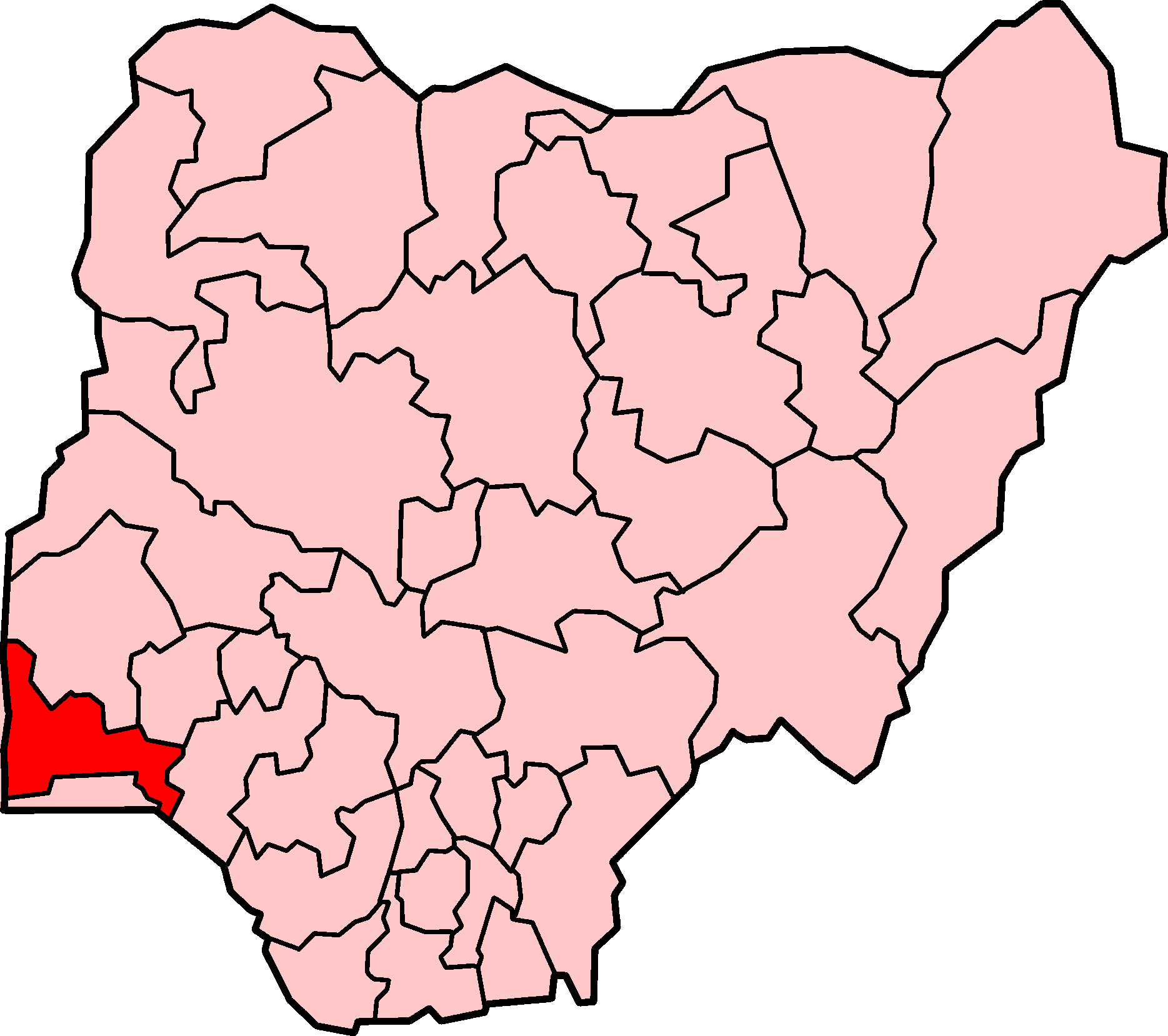 Localização do estado de Ogun na Nigéria.